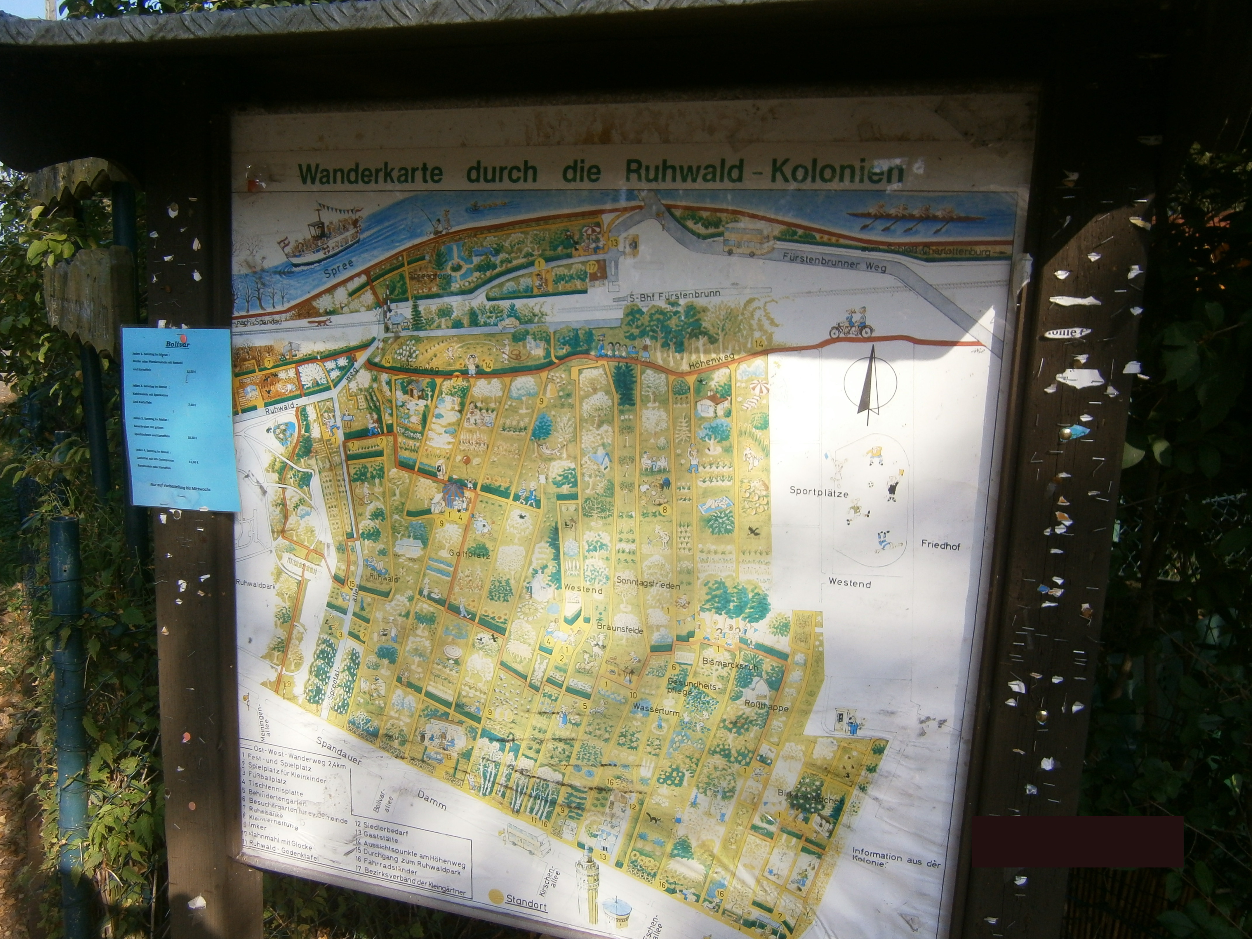 Die Laubenkolonien in Berlin-Westend. Übersichtstafel am Spandauer Damm.